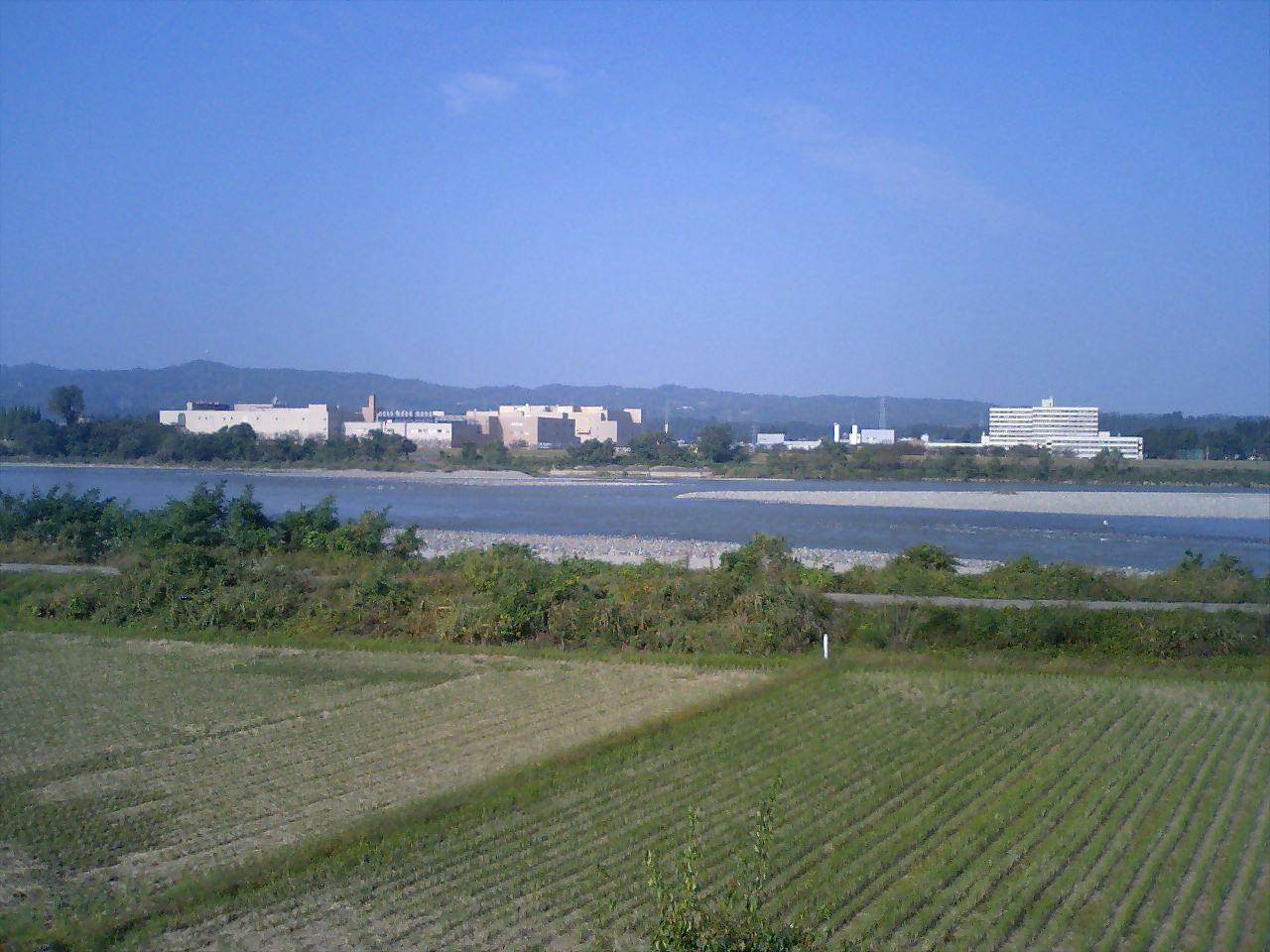 この画像は投稿者により、新潟県小千谷市大字薭生（信濃川東岸）より西岸の三洋半導体製造株式会社（現在のオン・セミコンダクター新潟、新潟県小千谷市千谷甲3000）本社社屋及び社員寮（小千谷市千谷甲3030）を撮影